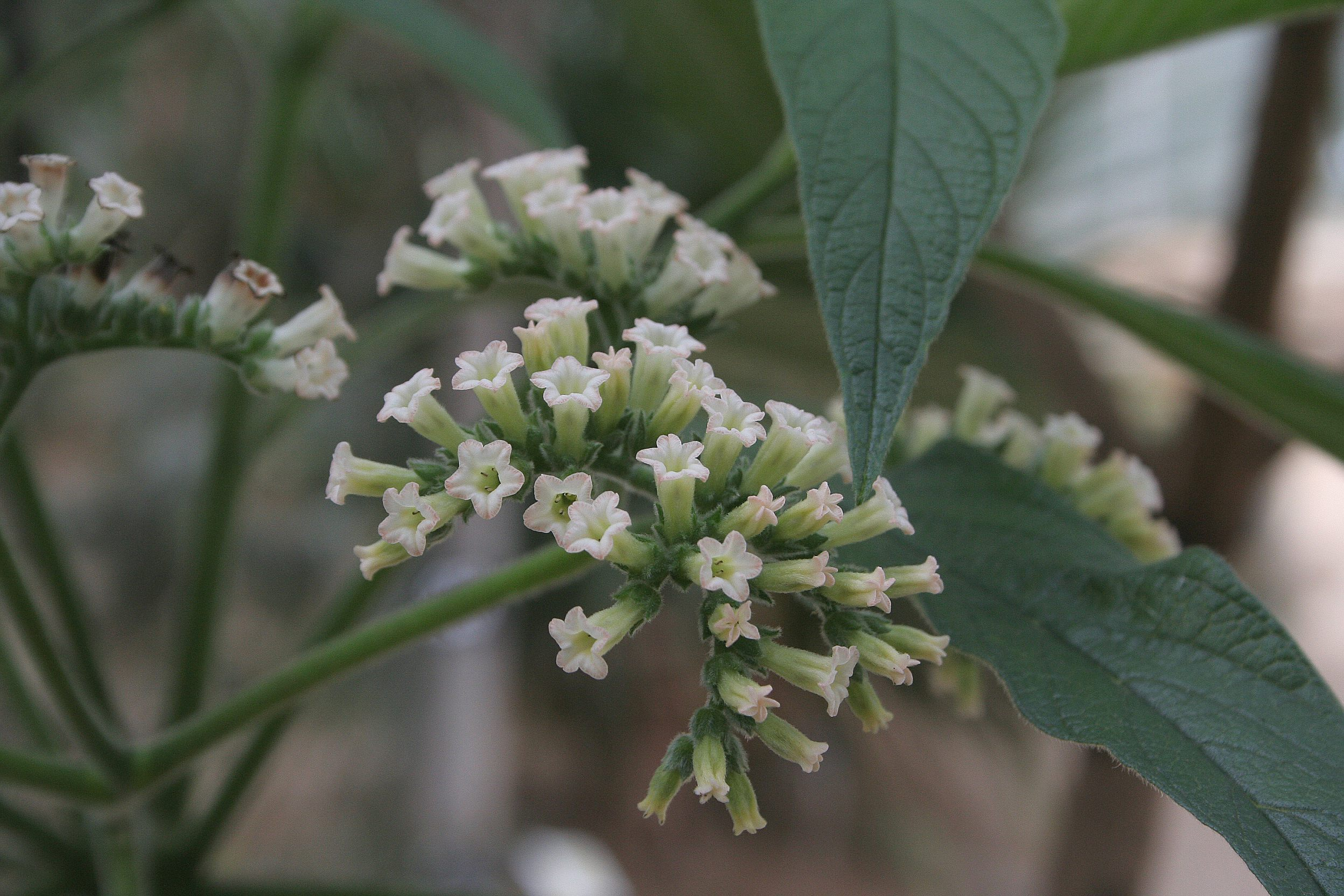 Tournefortia bojeri, conservatoire botanique national de Brest, France, juin 2007